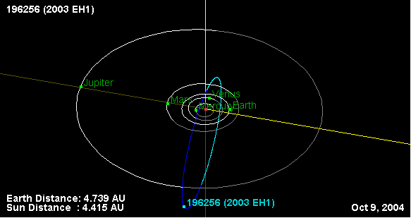 Орбита астероида (196256) 2003 EH1 и его положение в Солнечной системе